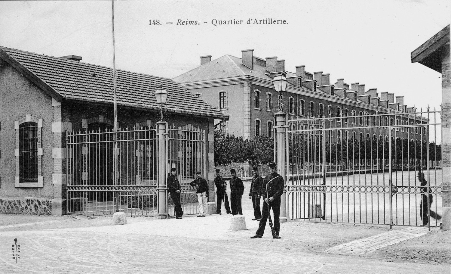 ancienne caserne à Reims.